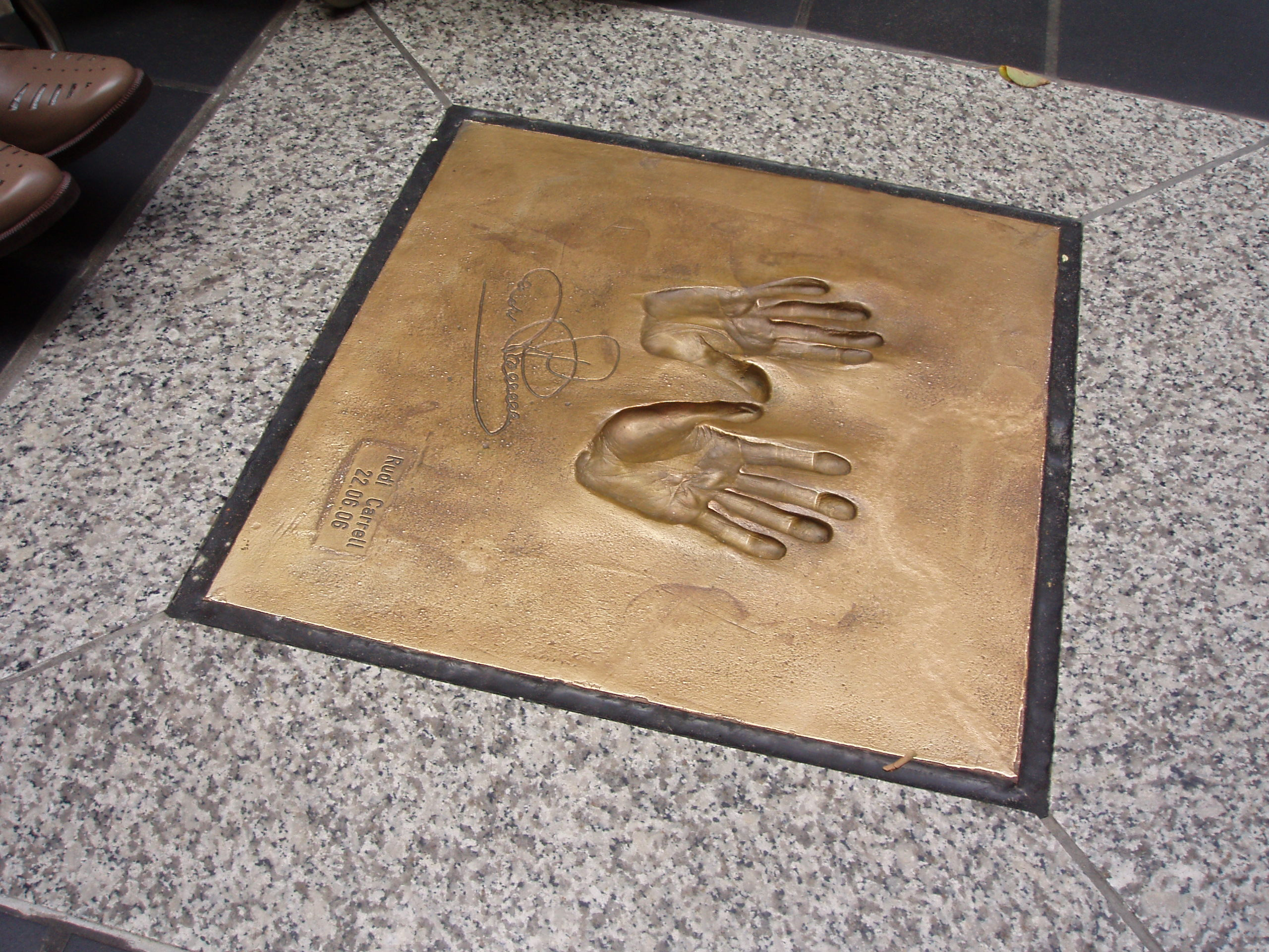 Abdruck der Hände von Rudi Carrell, in Bremen gesehen (befindet sich auf dem Fußboden in der Lloyd-Passage hinter Karstadt)